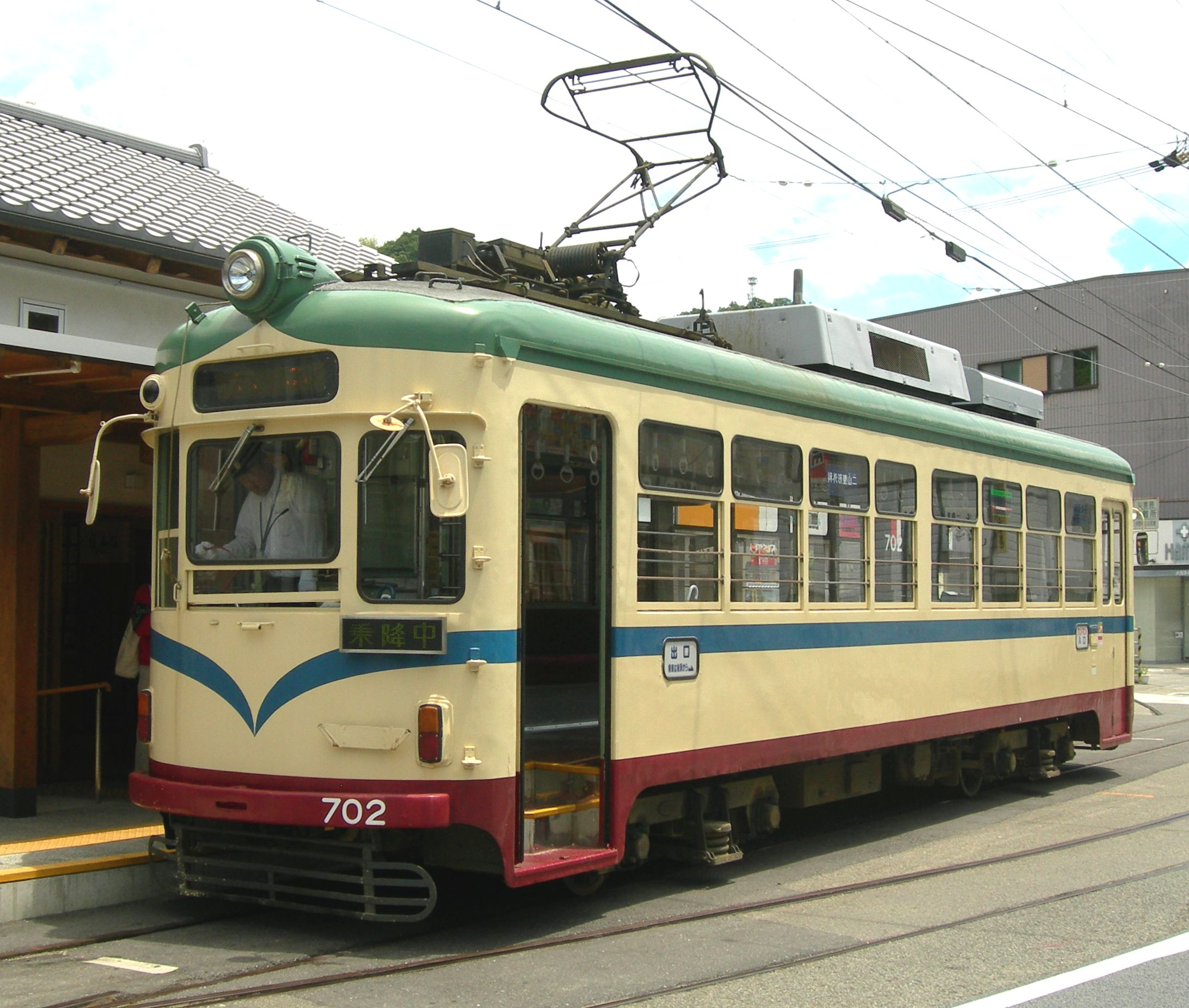 土佐電気鉄道700形電車